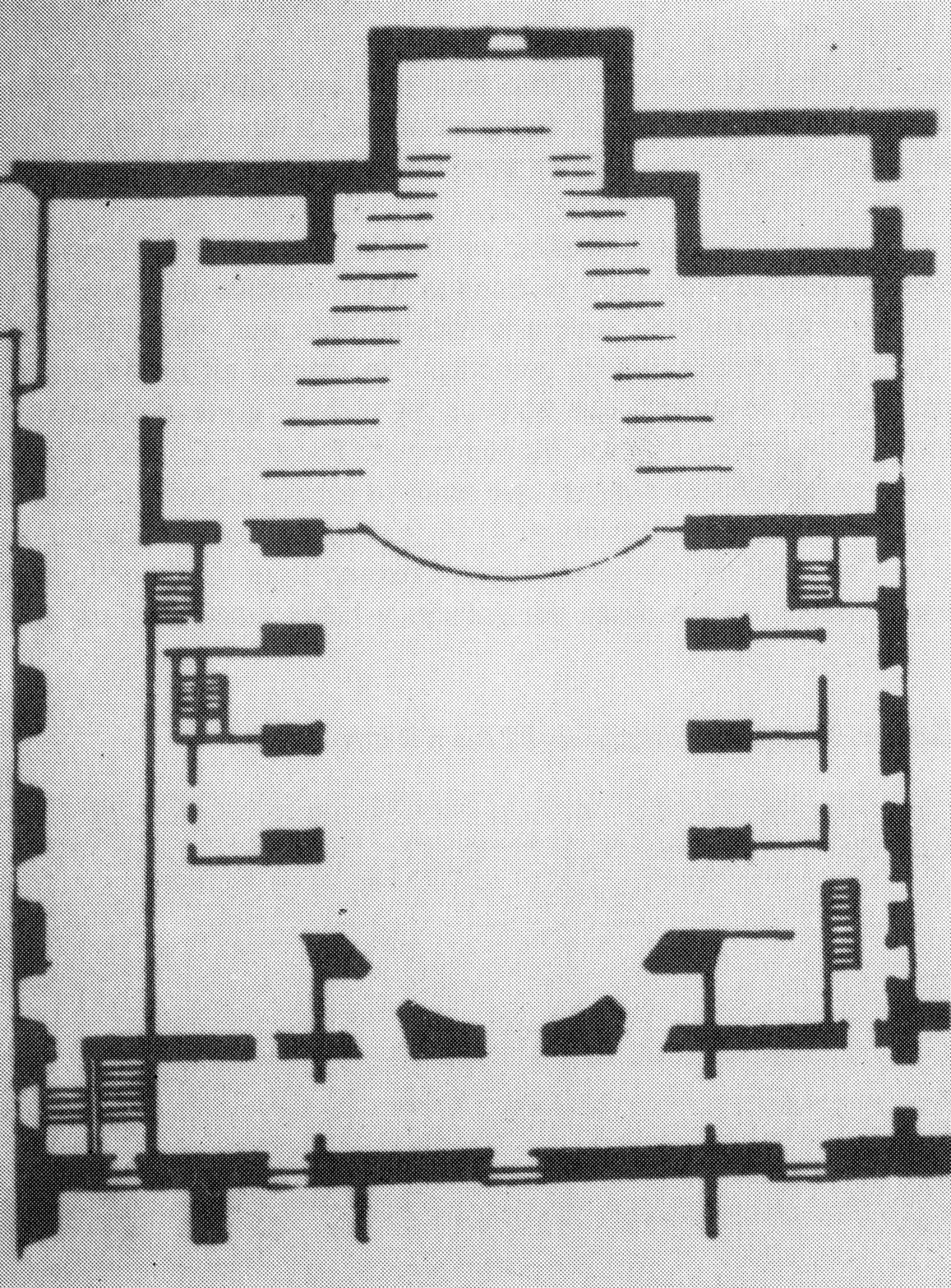 Planta del proyecto de remodelación del Coliseo del Buen Retiro de Madrid. Museo Municipal de Madrid.